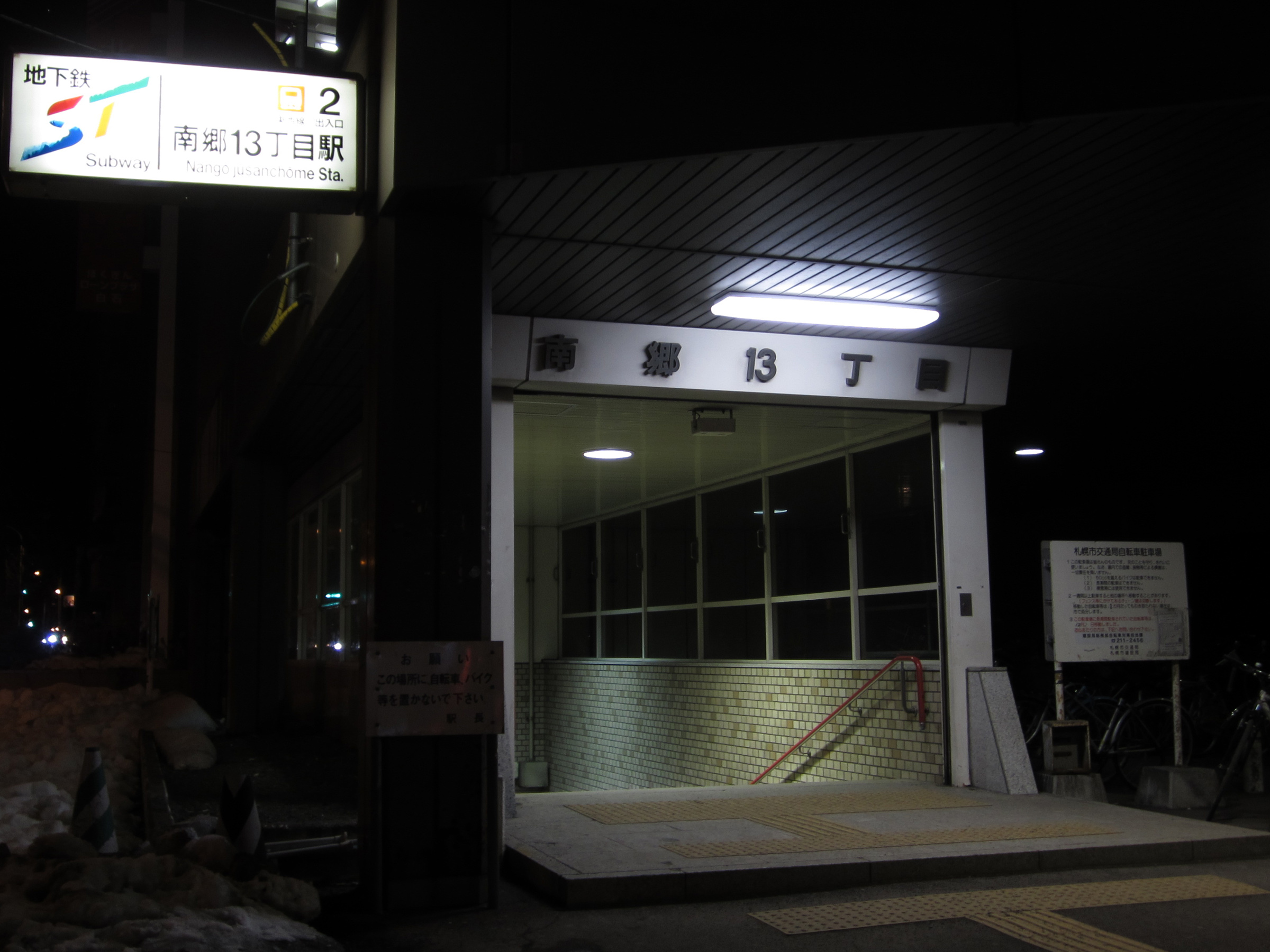 南郷13丁目駅2番出入口（北海道札幌市白石区）